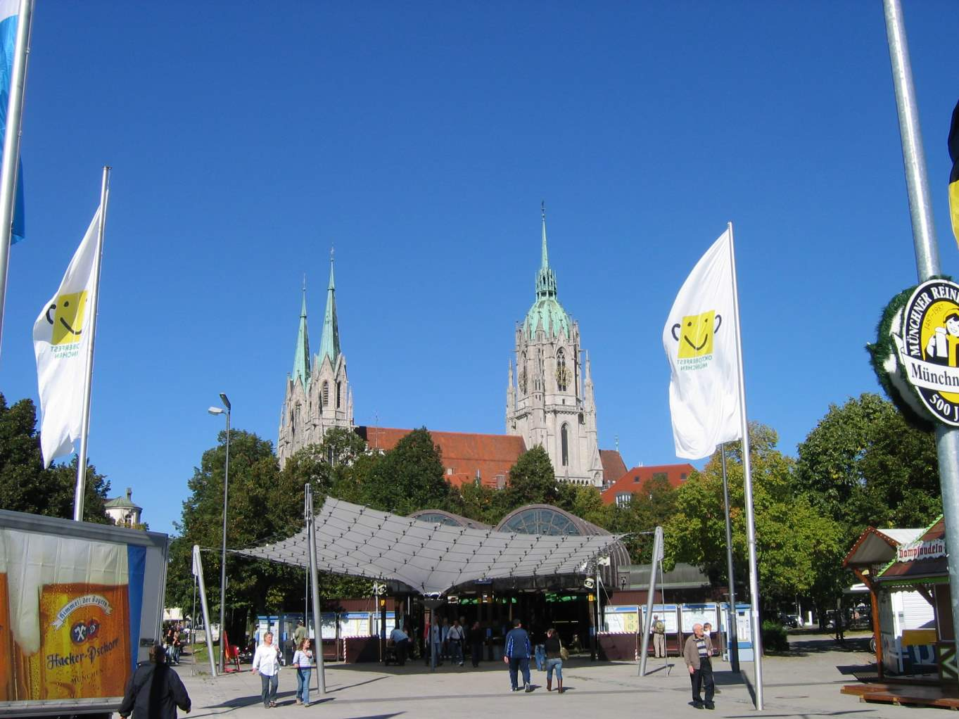 München, U-Bahnhof Theresienwiese, Südeingang, Underground-Station